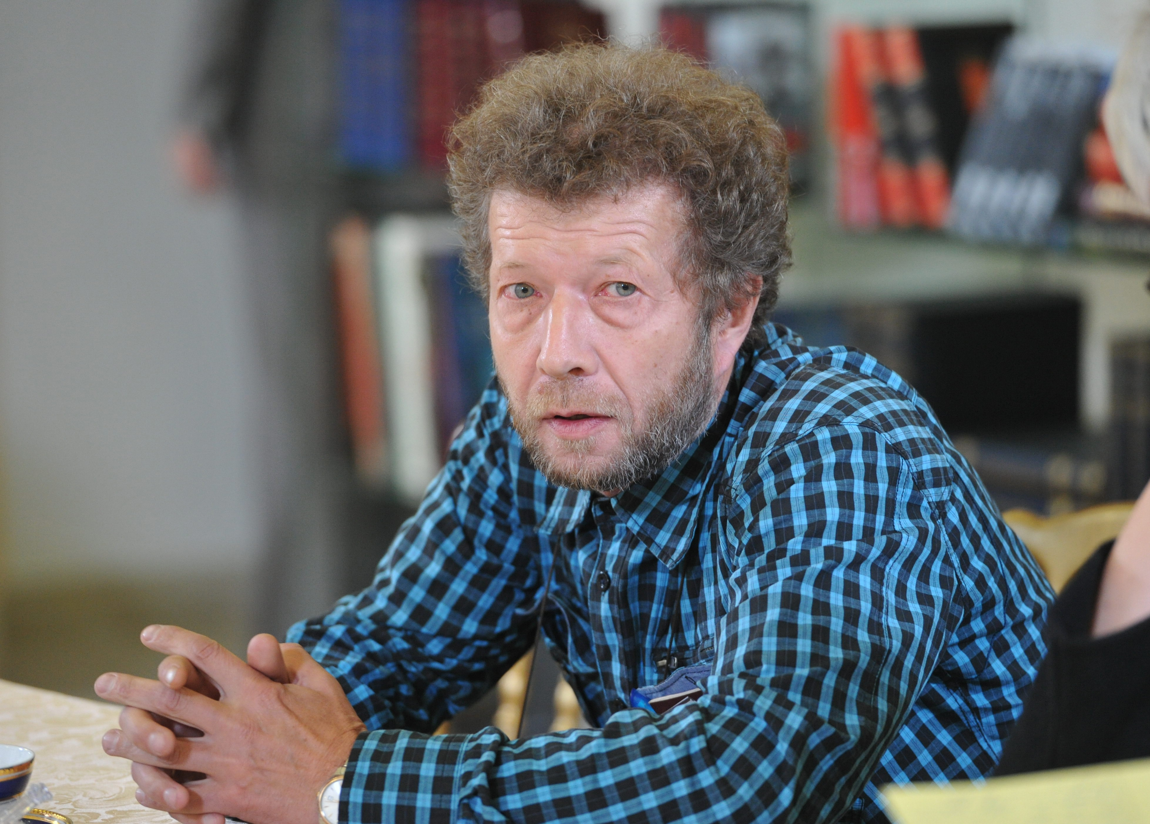 Еврейский детский писатель, поэт, драматург, сценарист А. А. Усачёв на съезде Российского книжного союза